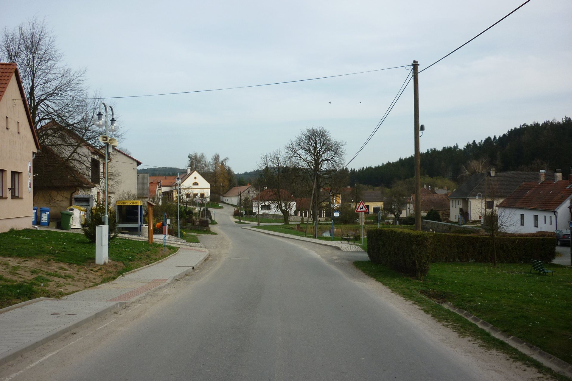 Bohuslavice, náves